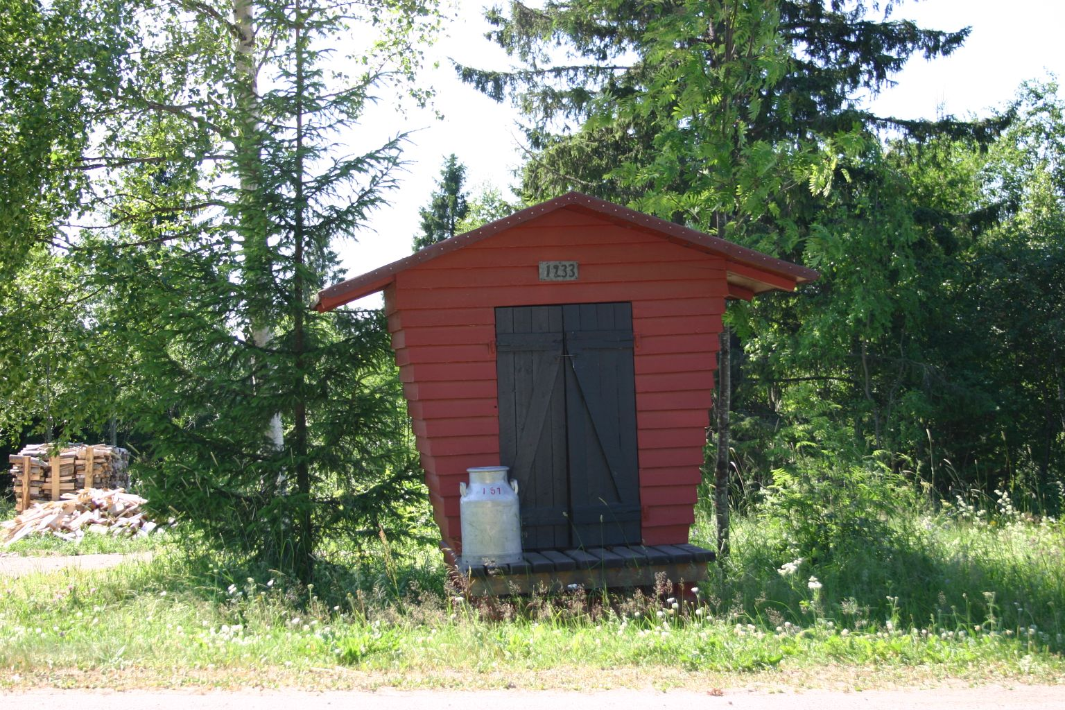 Maitolaituri